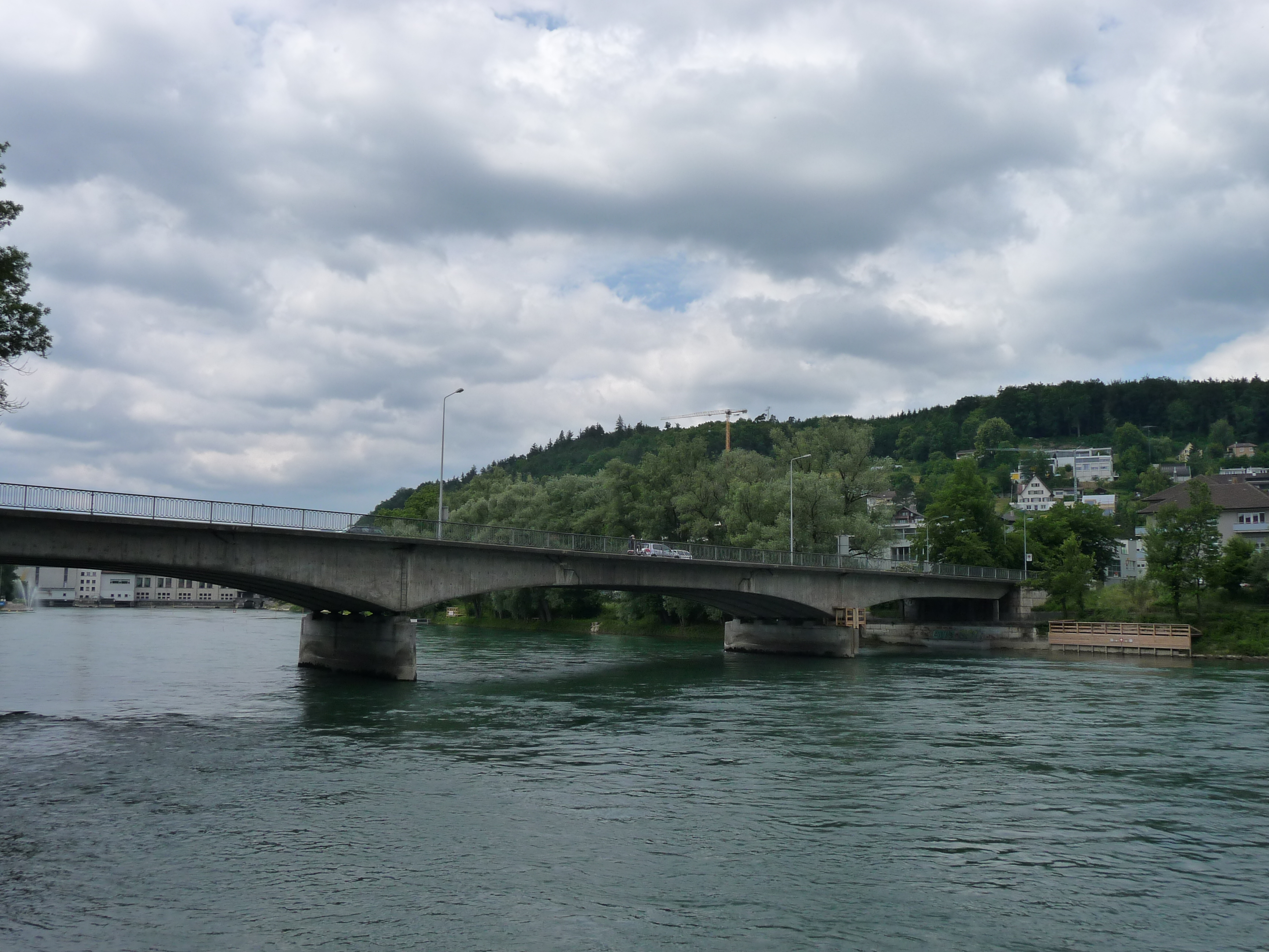 Kettenbrücke Aarau